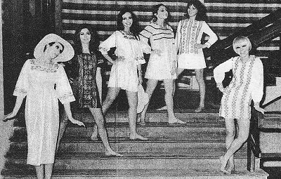 Mary Tapia y Marta Carlinsky junto a sus modelos presentando la nueva colección de su marca Nosfeartu. Revista Primera Plana.